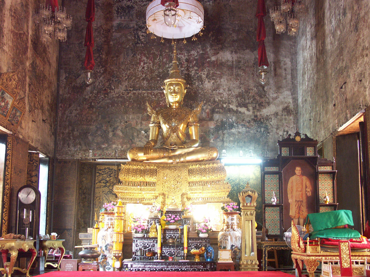 Nang Nong temple (วัดนางนองวรวิหาร), Bangkok, Thailand